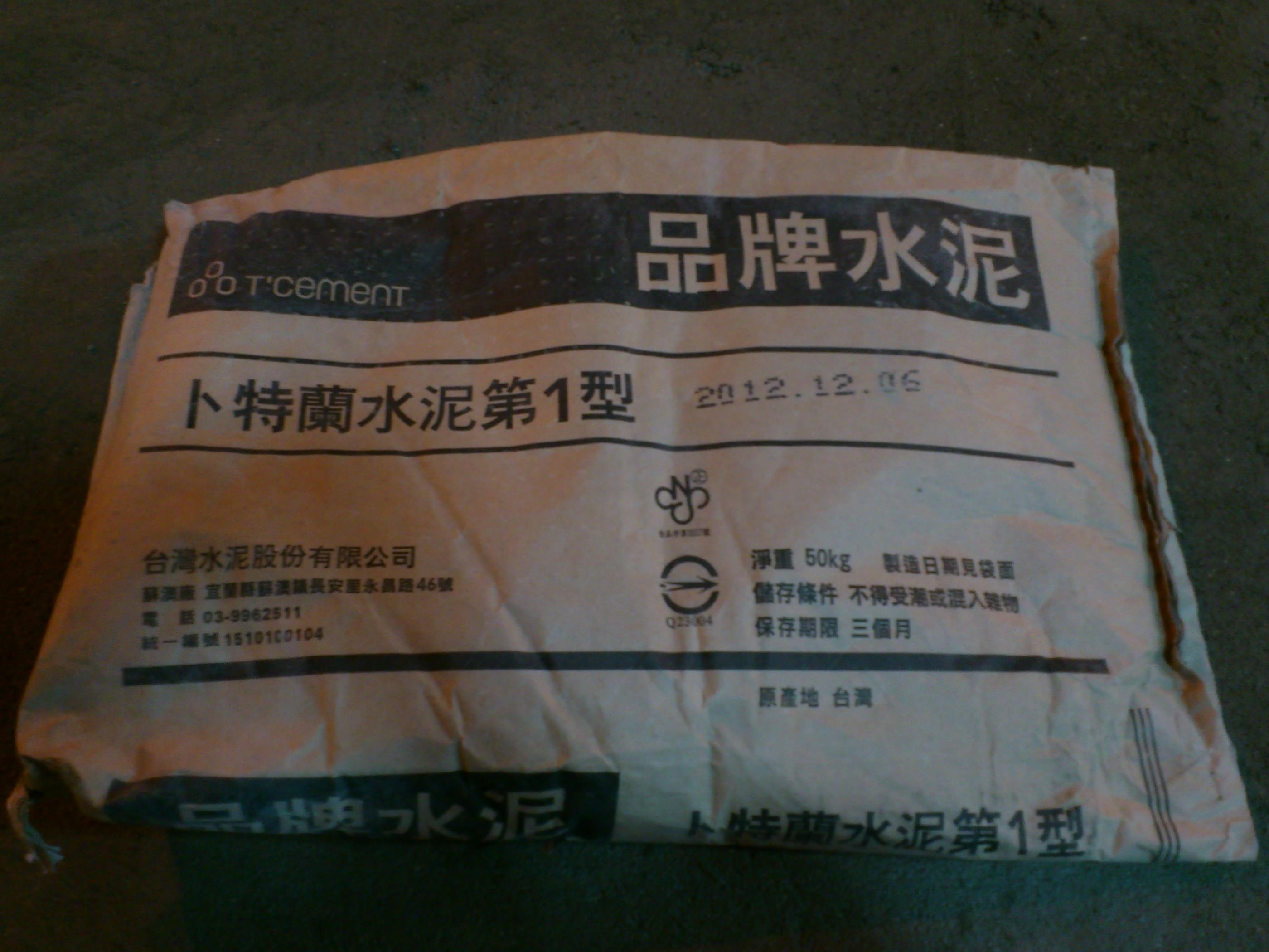 台灣水泥於2012年12月6日製造的品牌水泥卜特蘭水泥第一型50公斤包裝紙袋。